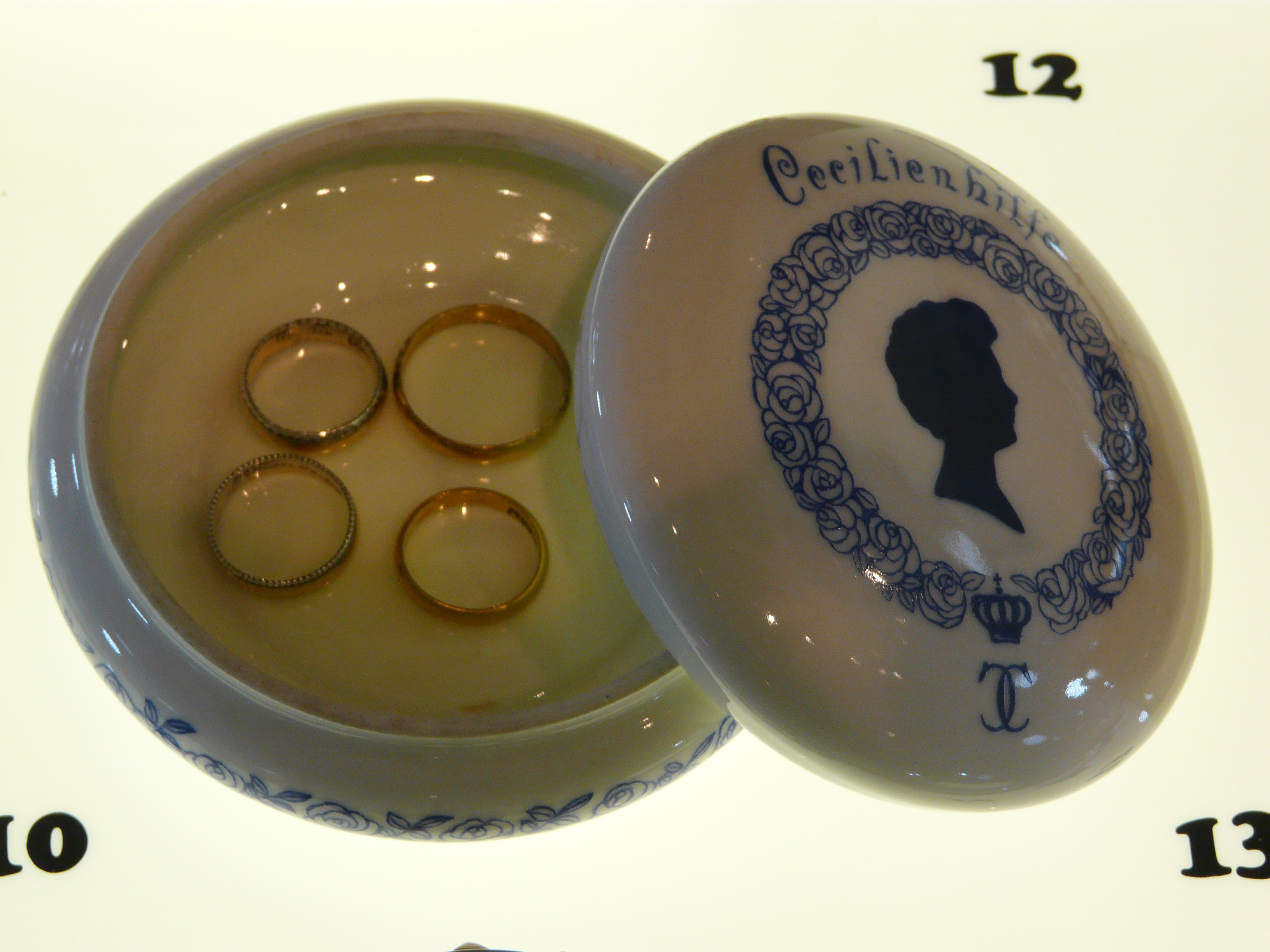 Gdańsk. Dom Uphagena